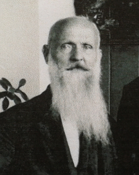 Anstalt für christliche Kunst Stärk & Lengenfelder -- Bildhauer Josef Staerk, etwa um 1920